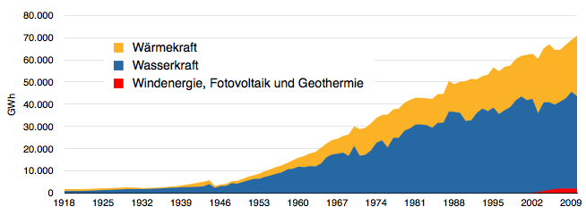 Aufgliederung der österreichischen Stromerzeugung